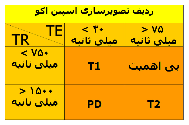 خودم جدول و شکل را ساختم. اما اعداد بر طبق اعداد ذکر شده در کتاب MRI: from Picture to Proton نوشته McRobbie است.